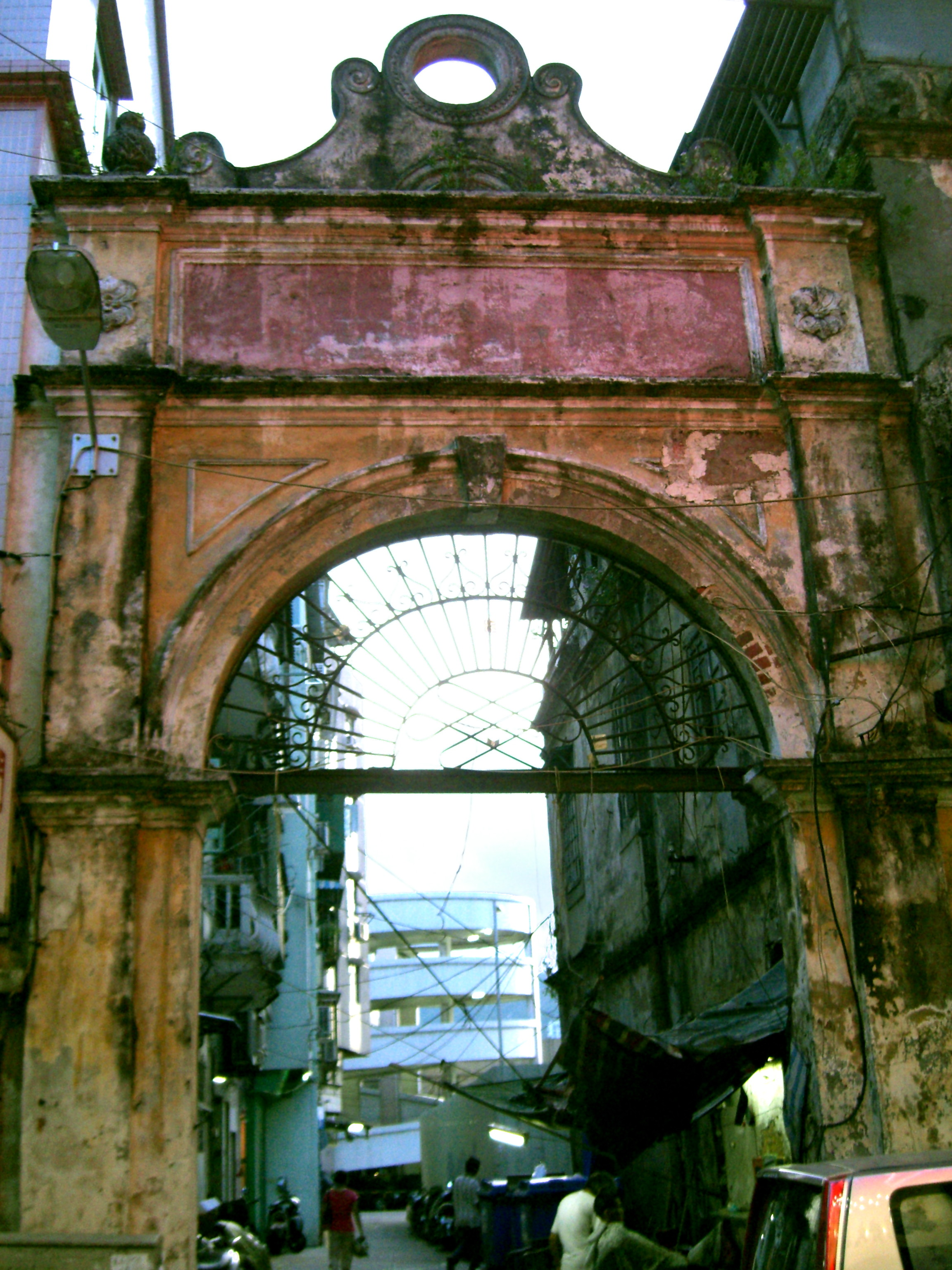 Rua de Cinco de Outubro